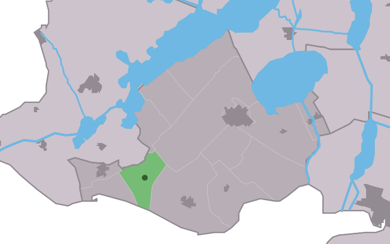 Kaartsje fan himrik fan Riis